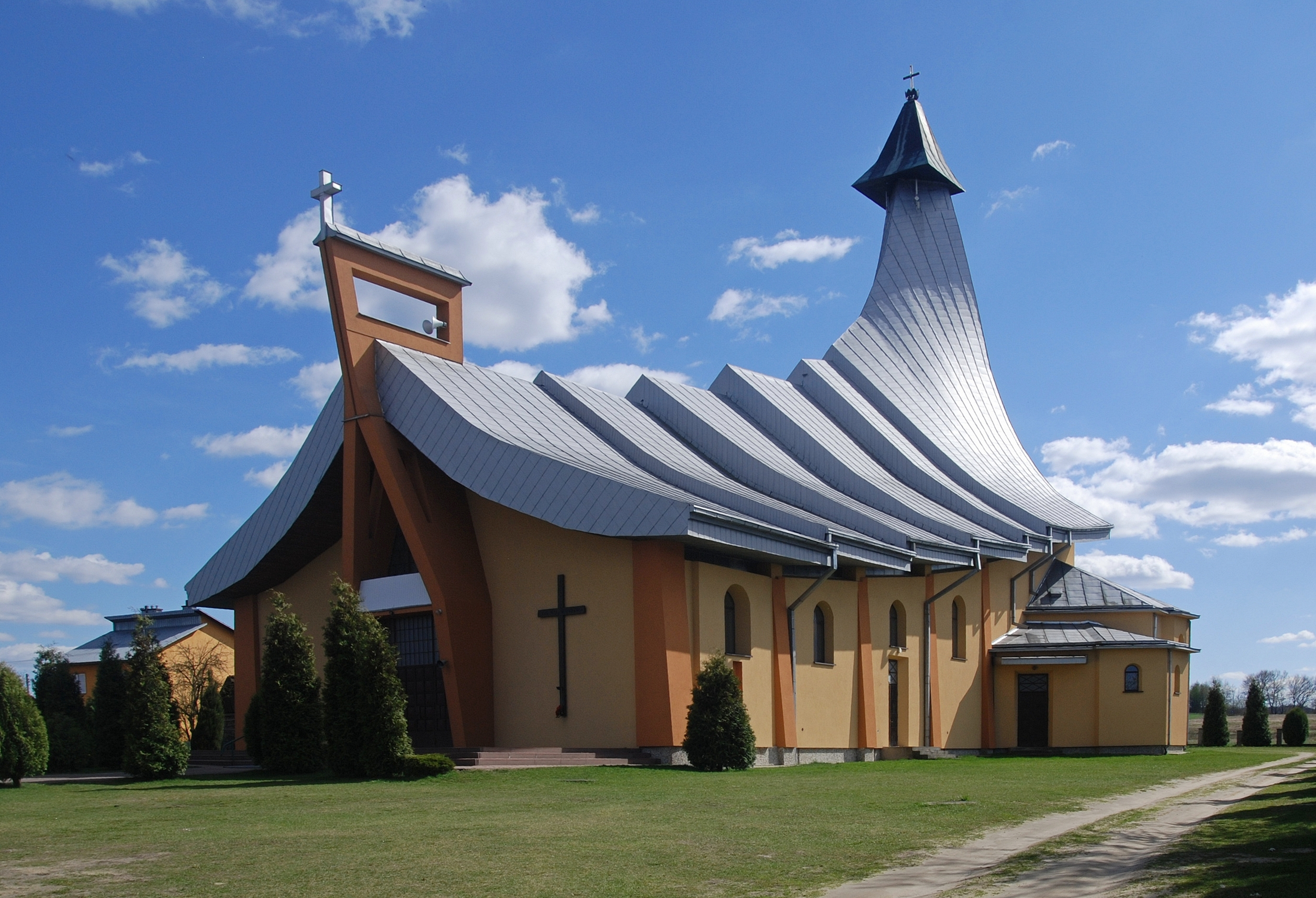 Łukawiec, Kościół Objawienia Pańskiego w Łukawcu Wikidata has entry Q19886645 with data related to this item.